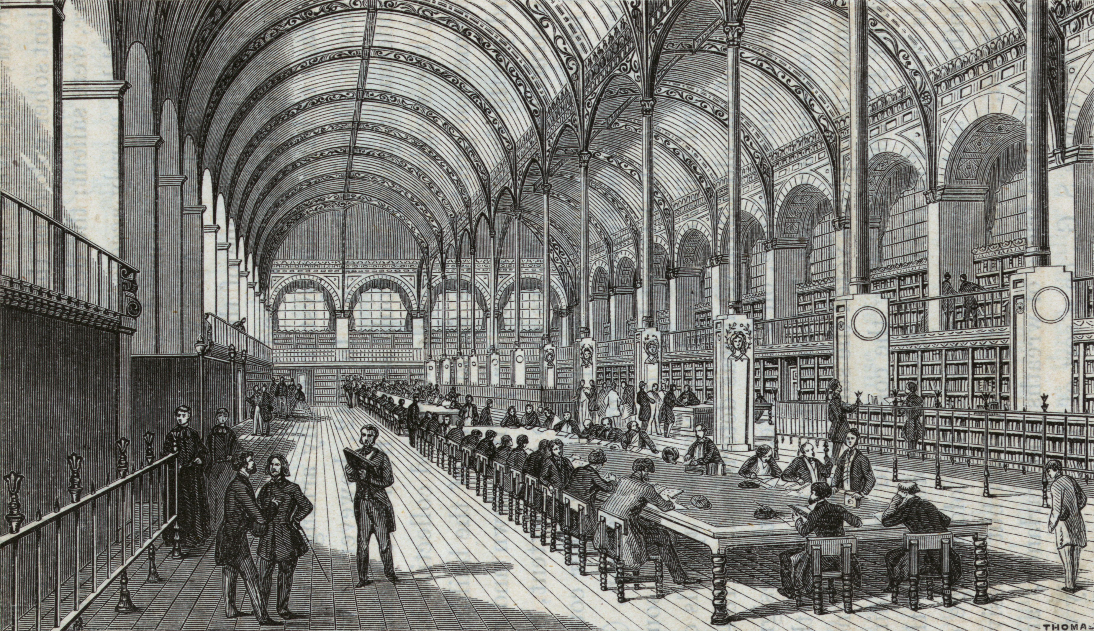 New library of Sainte Geneviève (Paris, 1859). Nouvelle bibliothèque Sainte-Geneviève (Paris, 1859). .